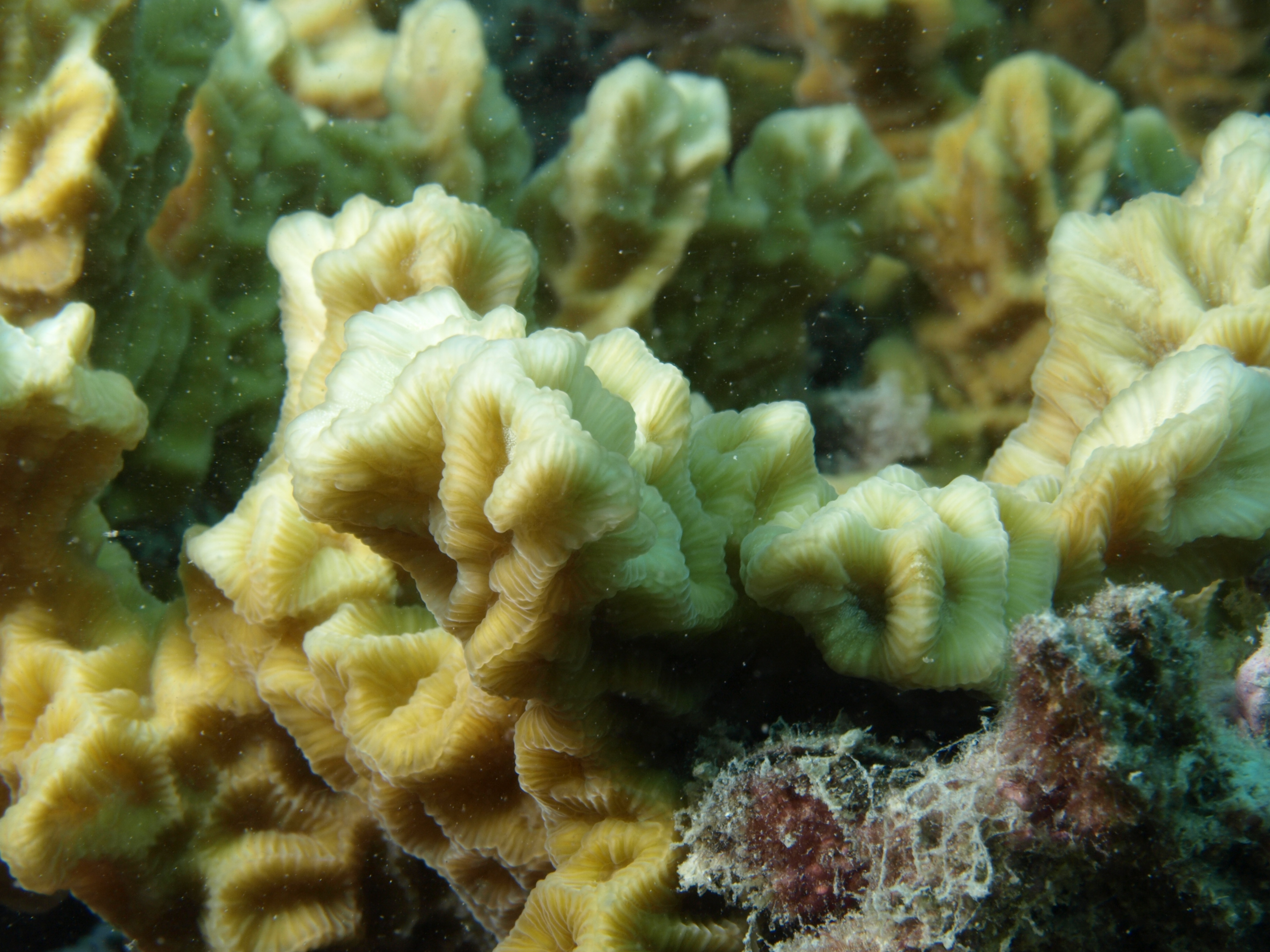 Australogyra zelli, detalle de coralitos. En isla Aureed, Estrecho de Torres, Australia